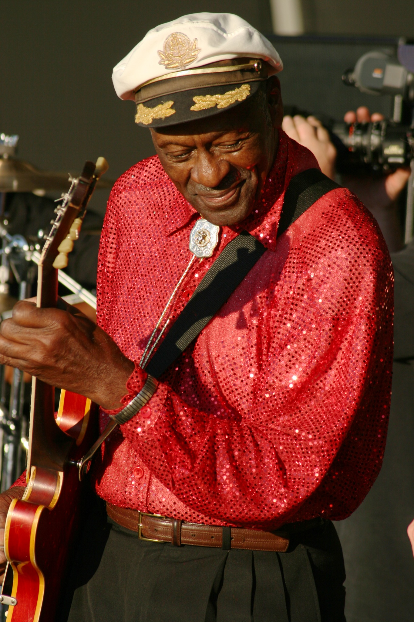 Chuck Berry en el Virgin Fest de 2008